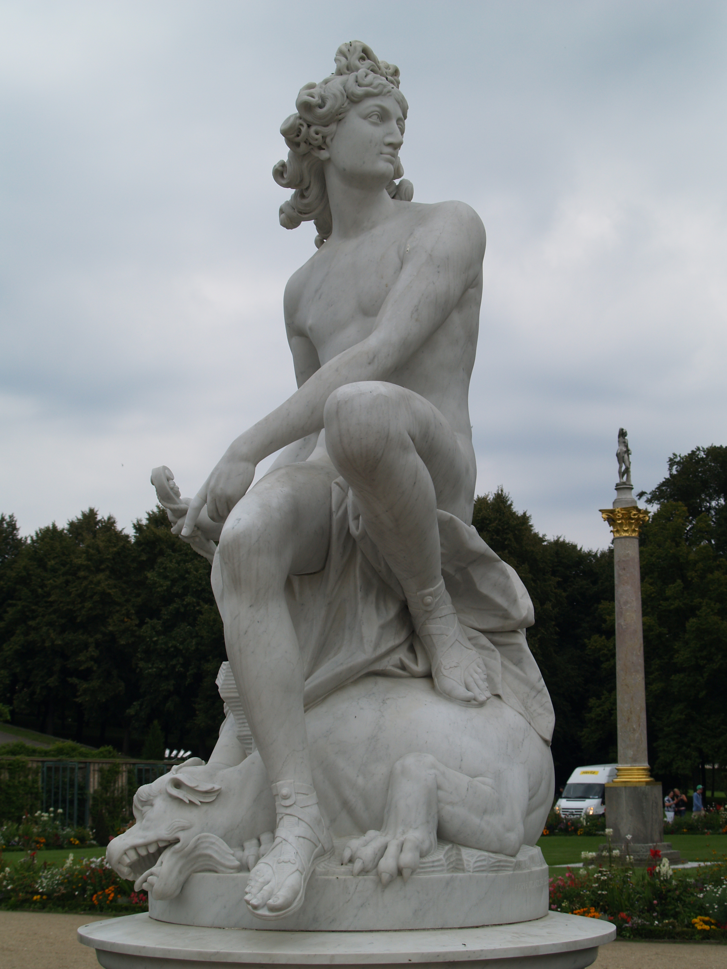 Estatua de Apolo. Jardines de Sanssouci.